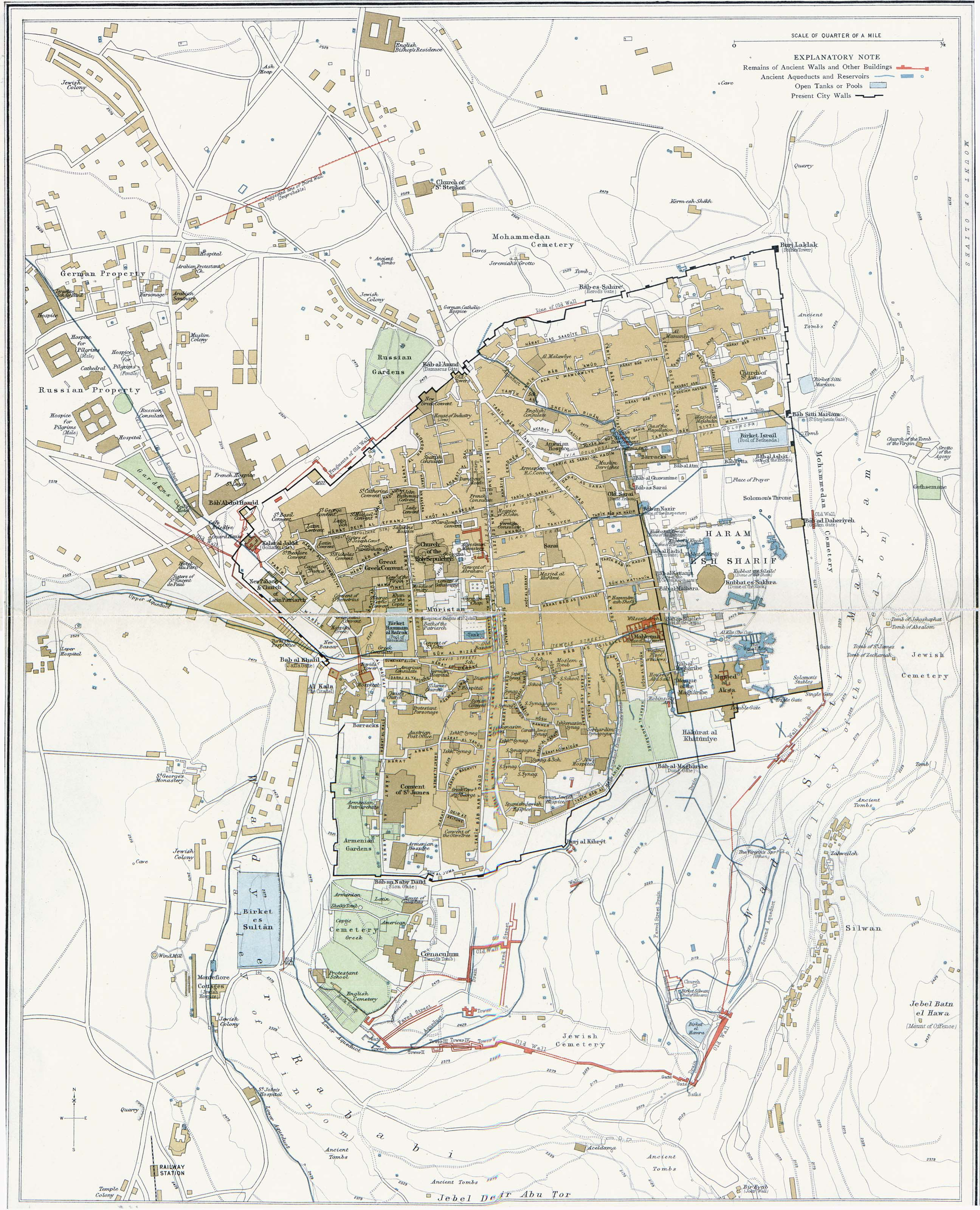 Map of Jerusalem, 1915